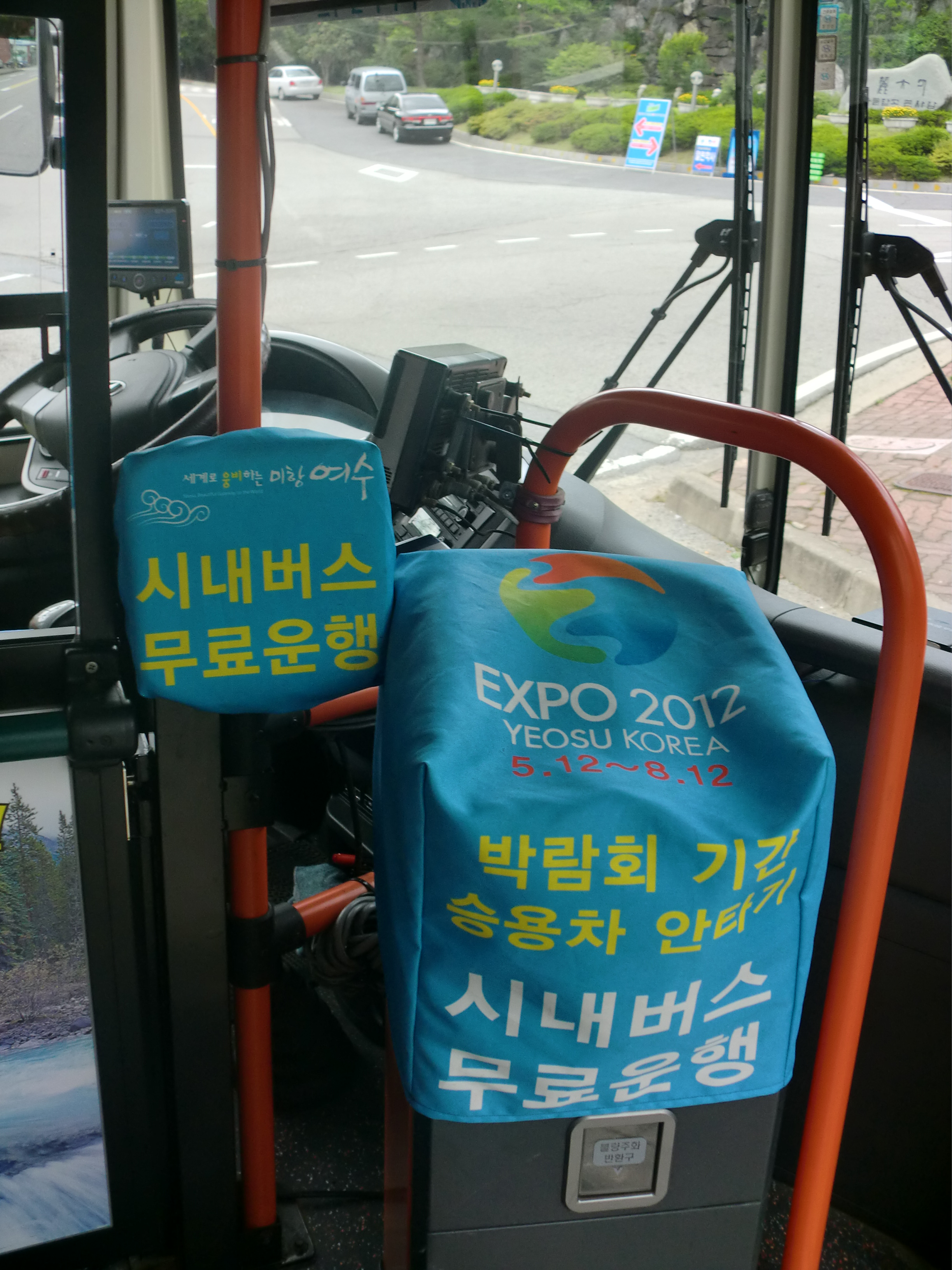 여수 엑스포기간중은 시내버스요금은 무료이므로 요금함 카버